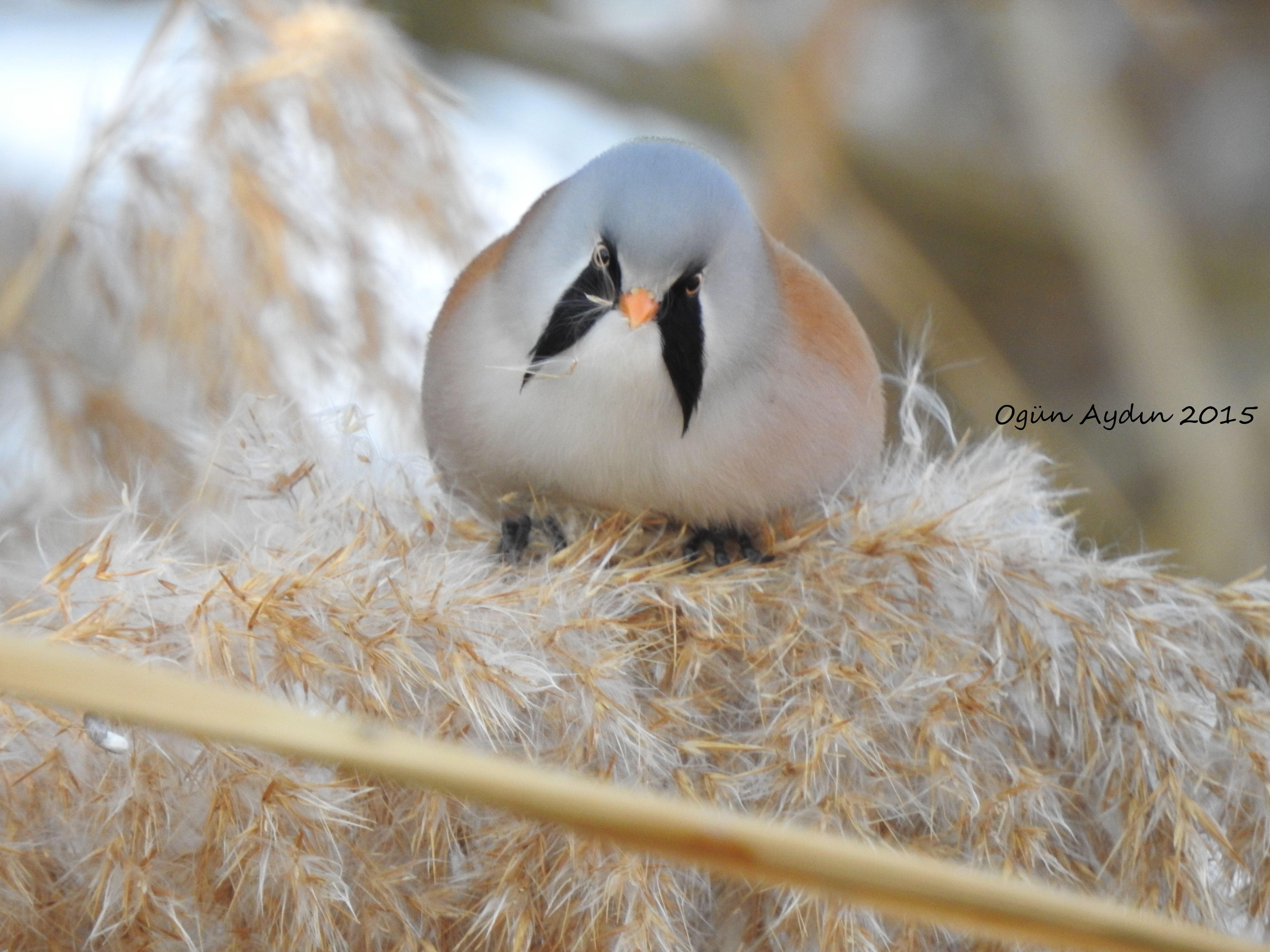 Bıyıklı Baştankara